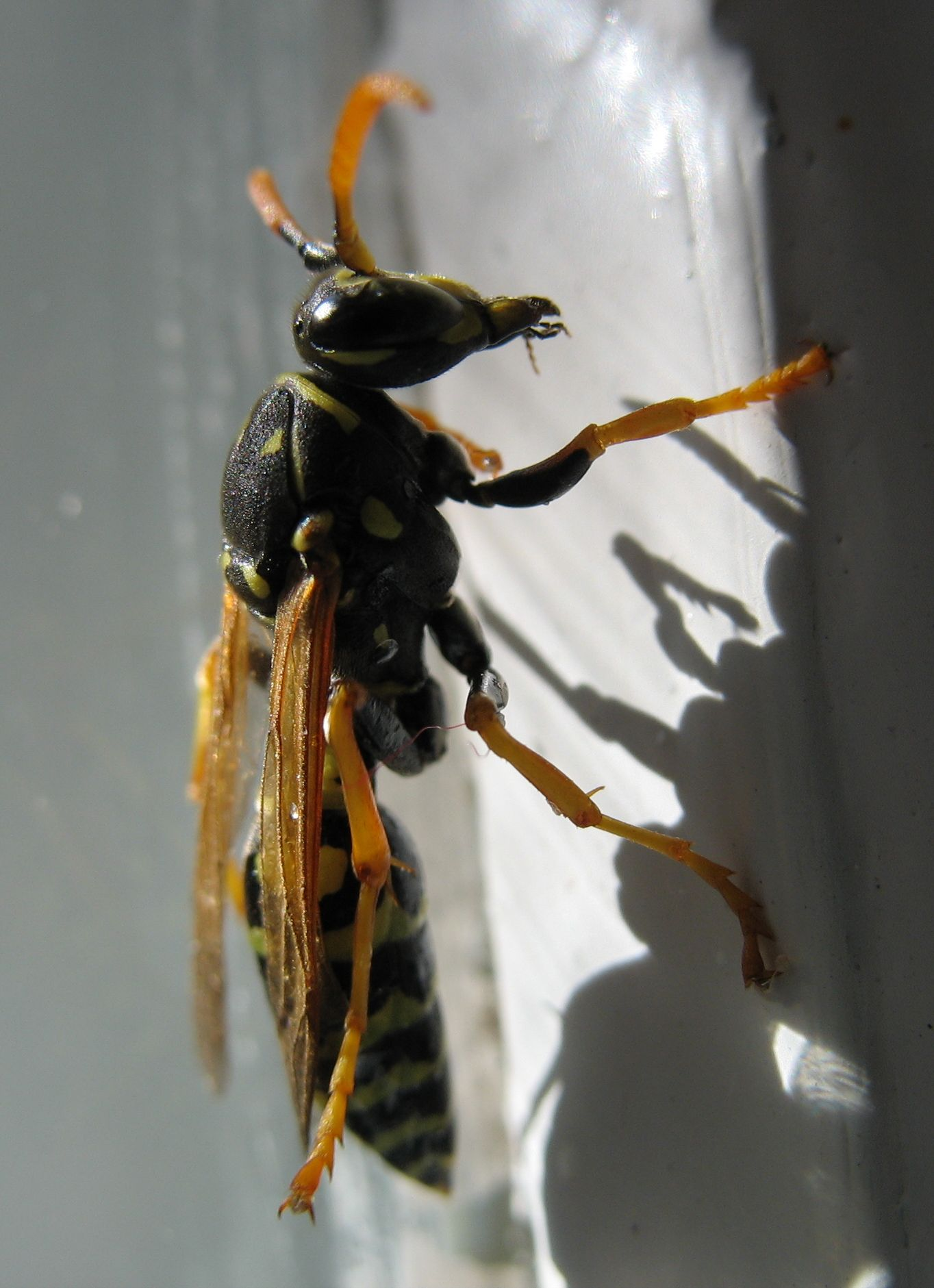 Wasp. Ukraine, Dnipro.